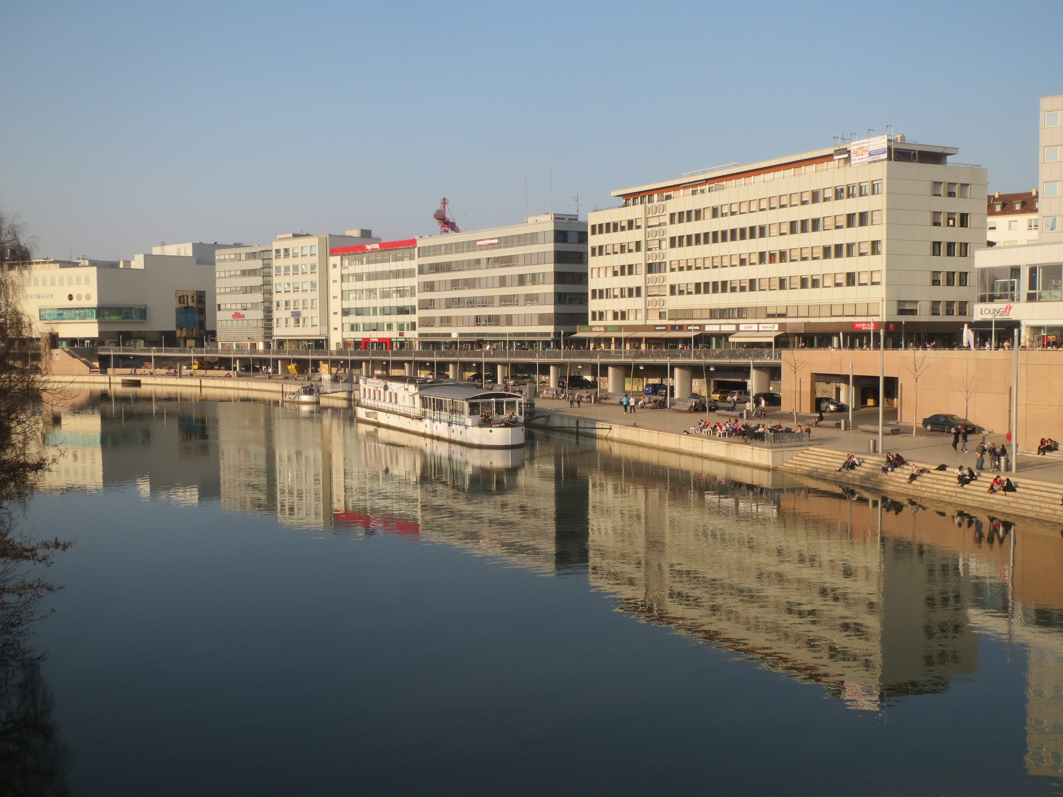 Berliner Promenade (Saarbrücken)